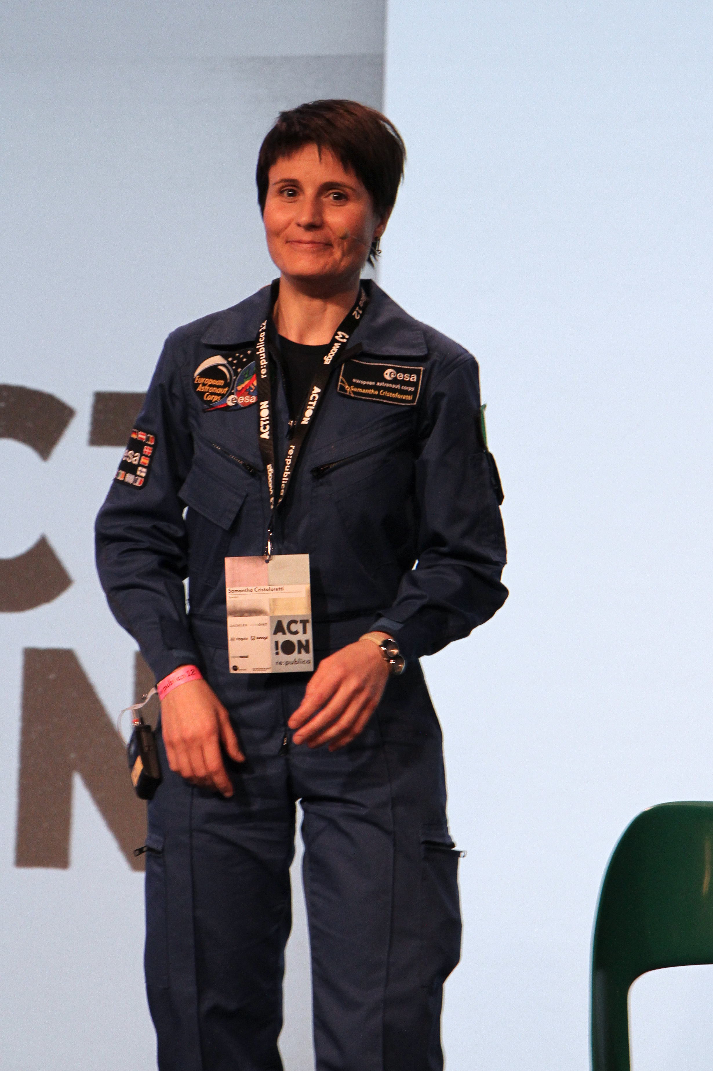 Samantha Cristoforettis talk "Twittern aus dem All für die digitale Öffentlichkeits­arbeit"